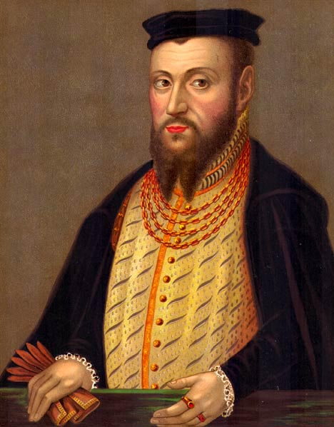 Sigismund II Augustus